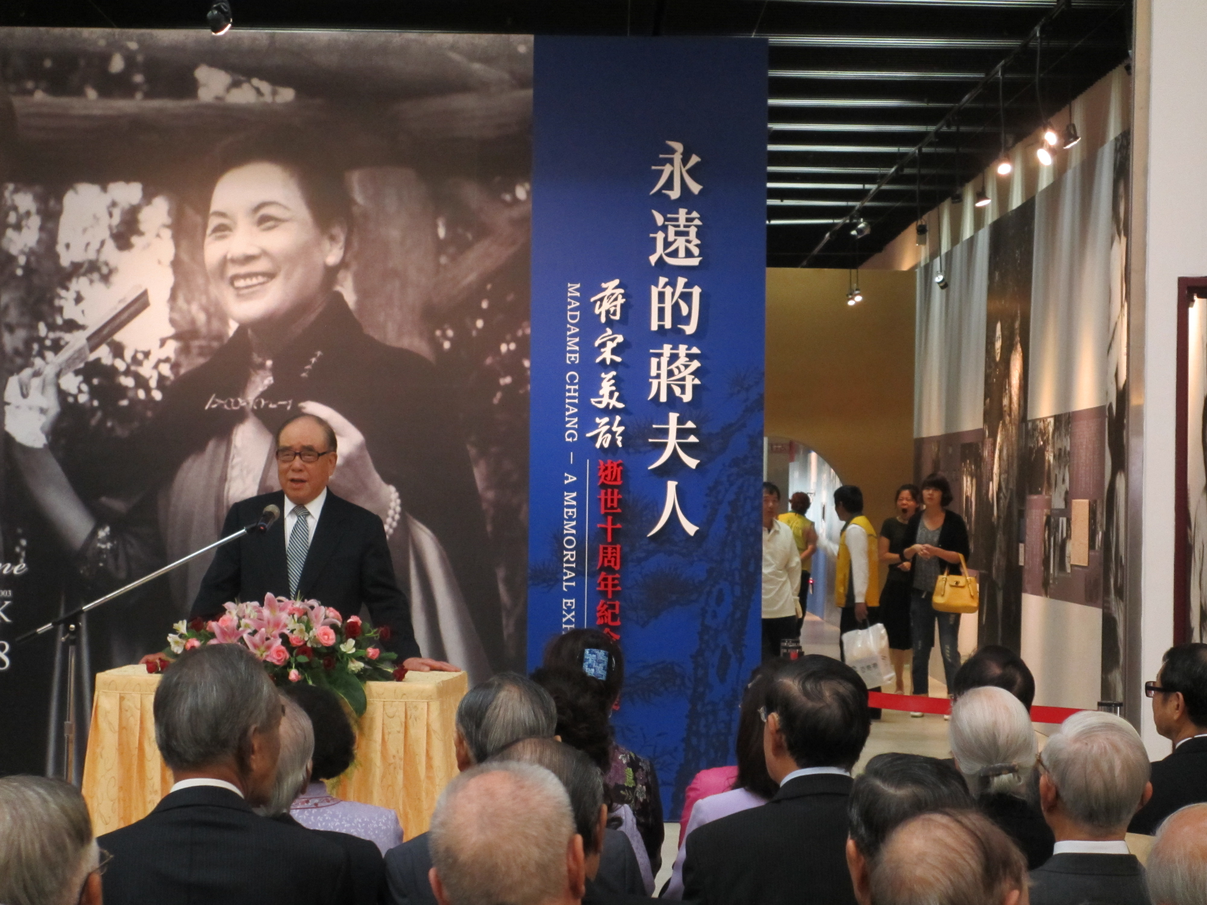 台灣舉辦特展紀念蔣宋美齡。